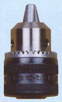 Puuripadrun